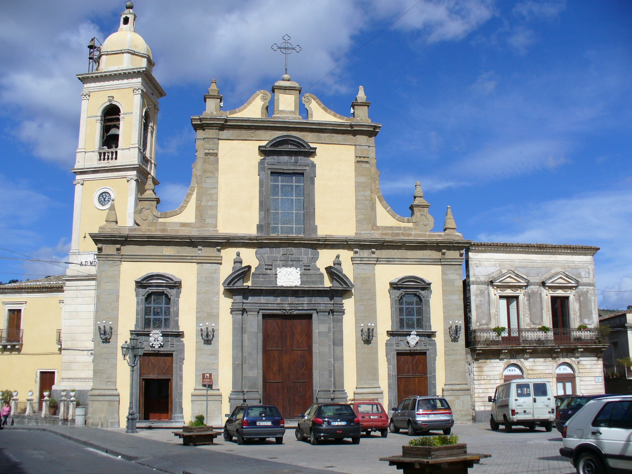 Linguaglossa: Santa Maria delle Grazie.